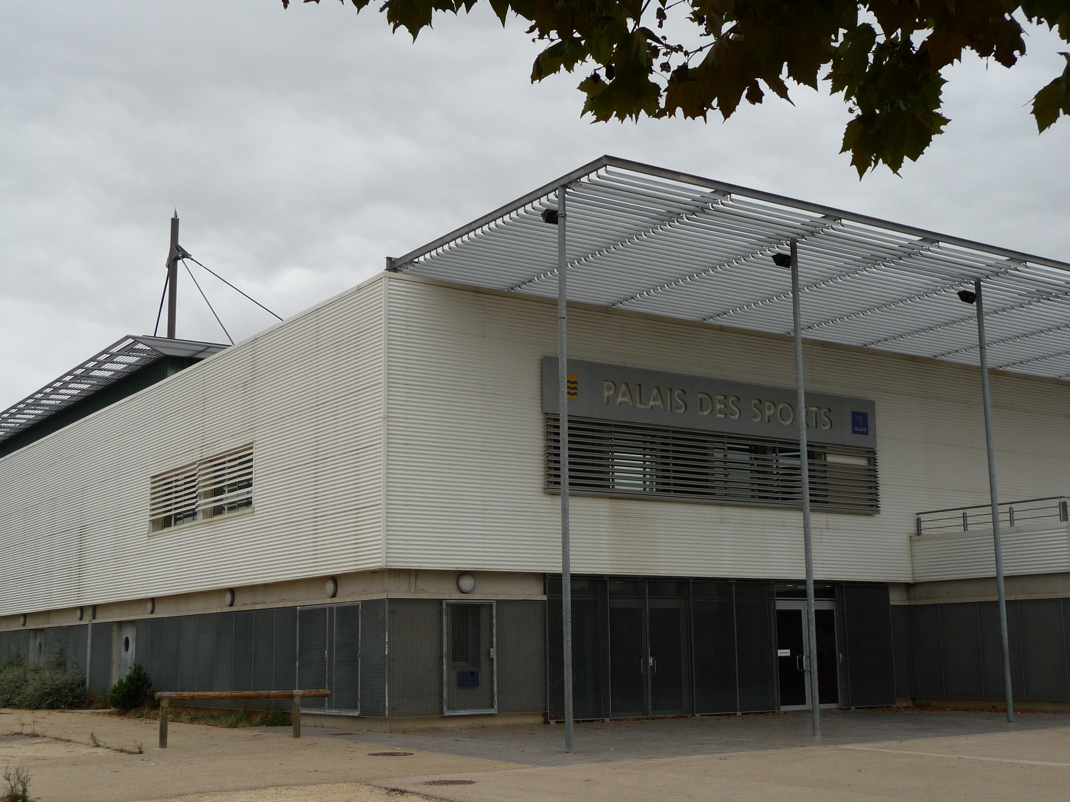 Palais des sports à Agde (Hérault, France)